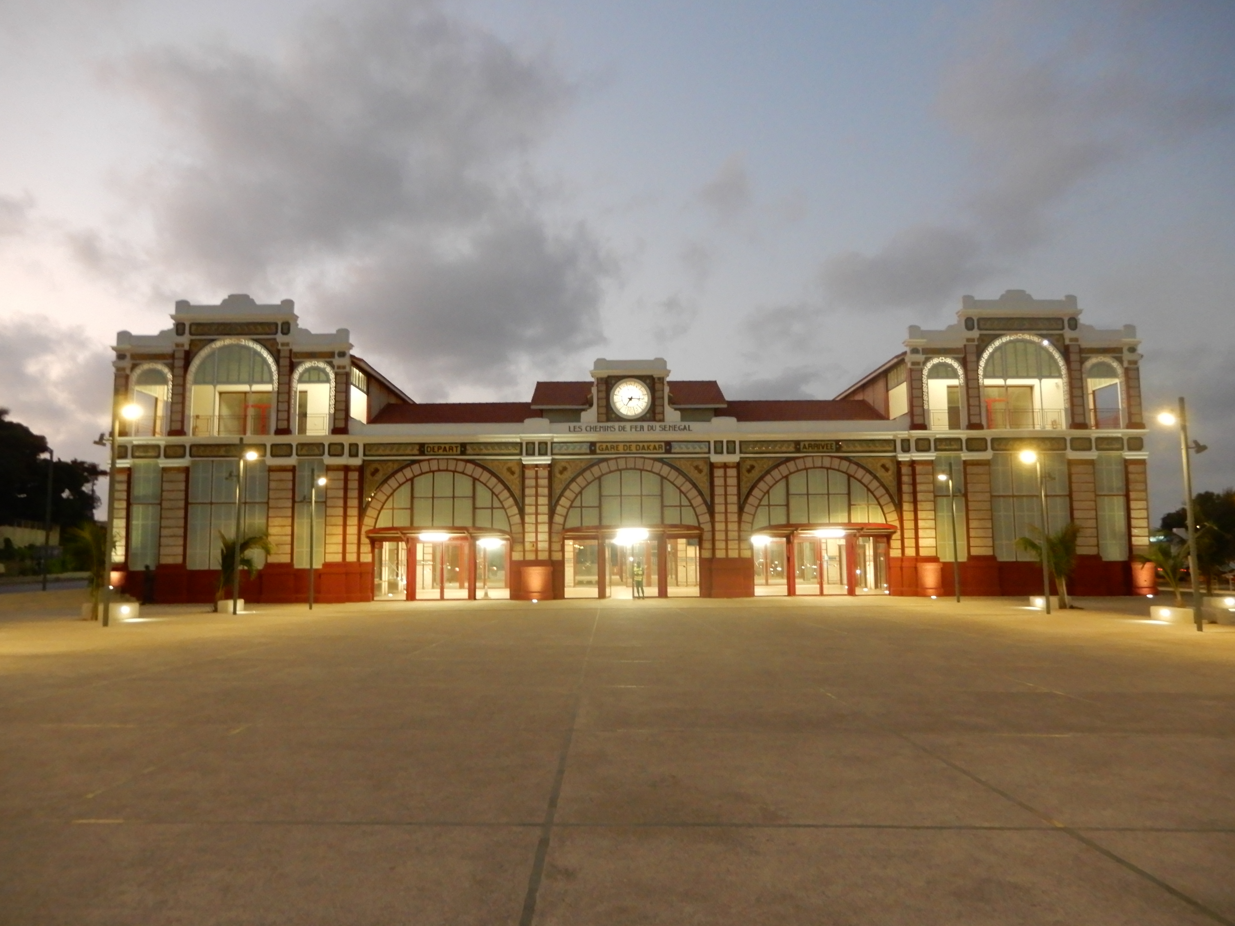 Gare de Dakar vue de face, fin septembre 2019